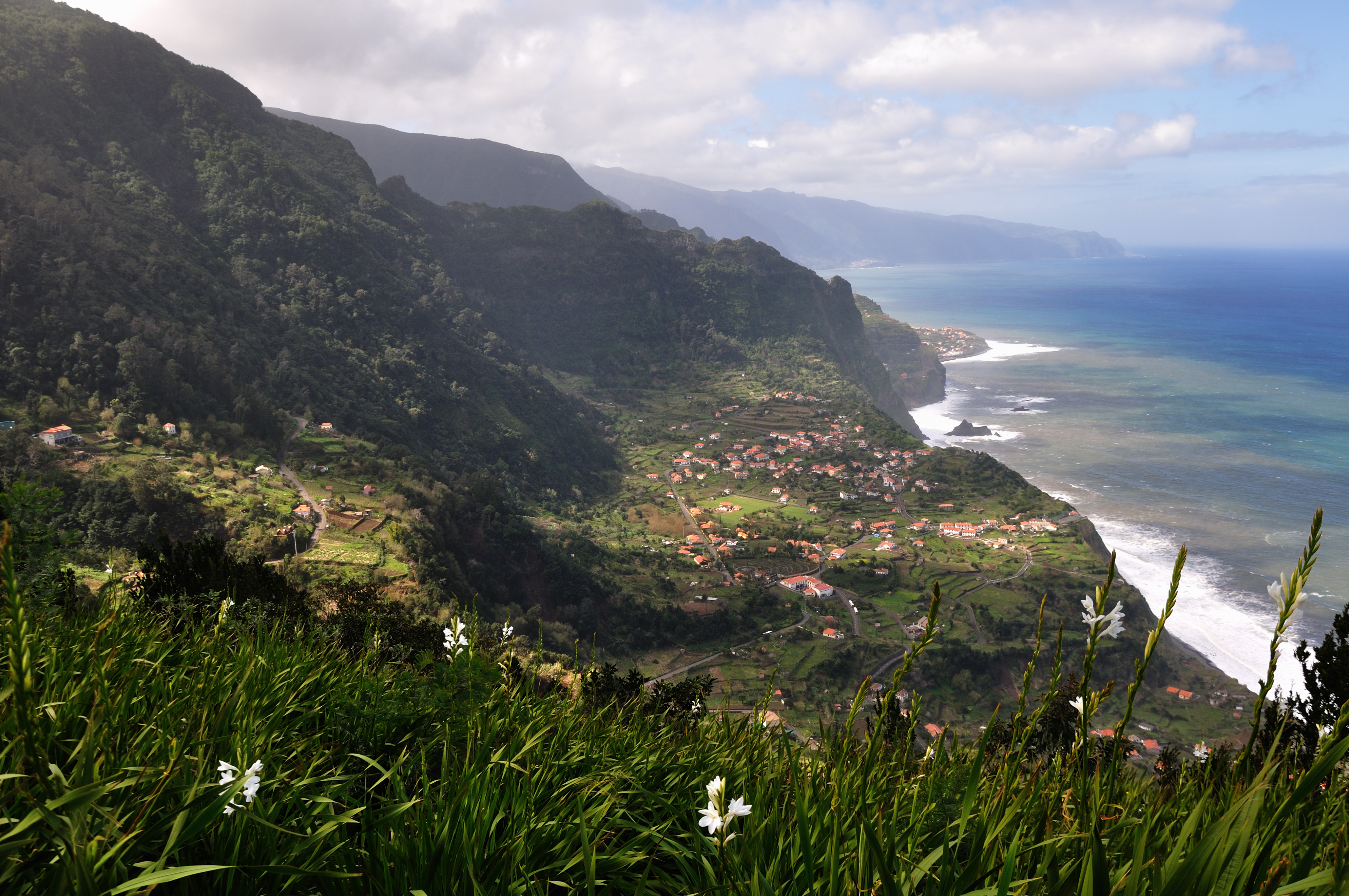 Portugal, Madeira, views in São Jorge